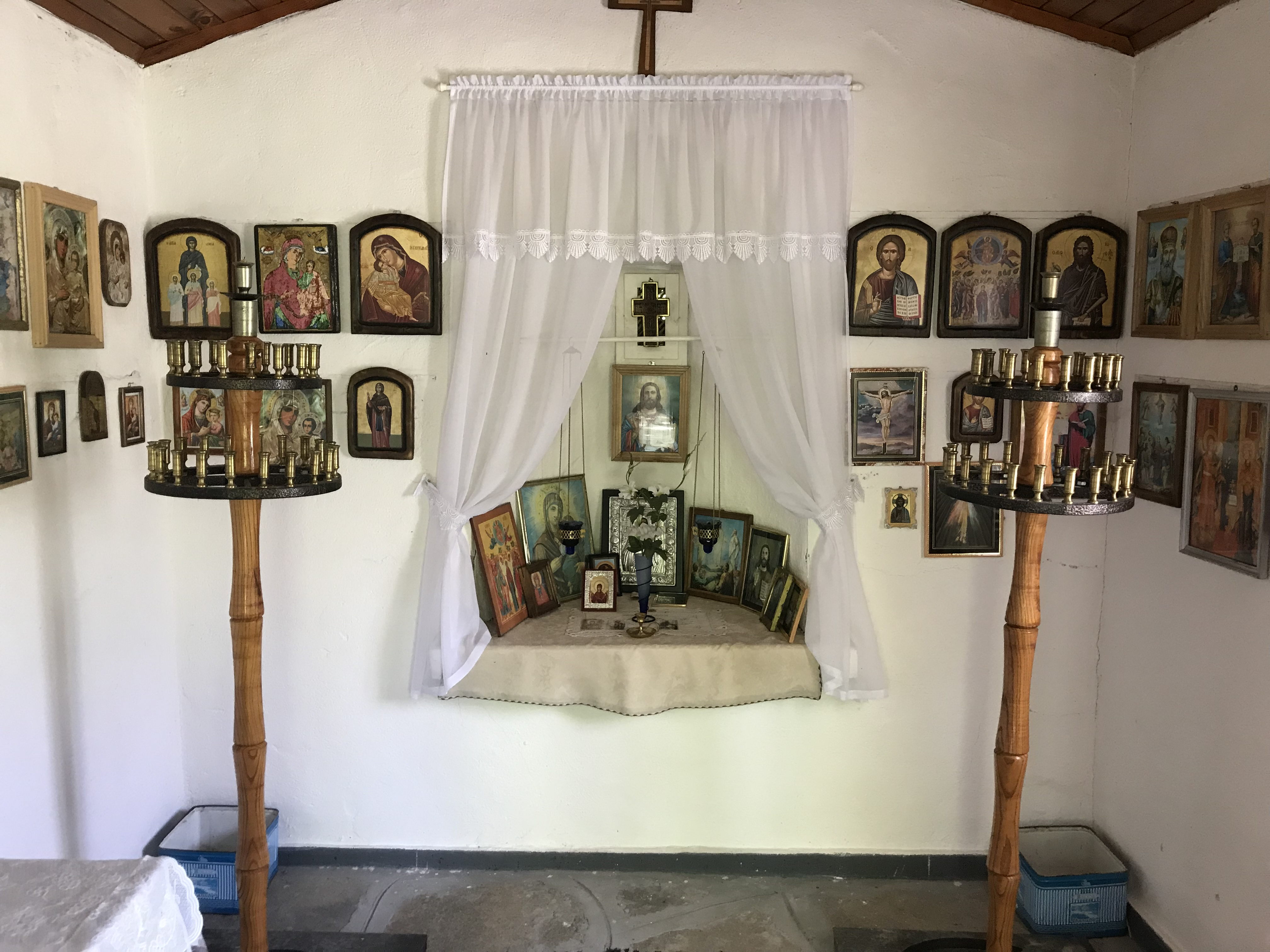 Иконостас в “Свети Спас”, с. Бойково